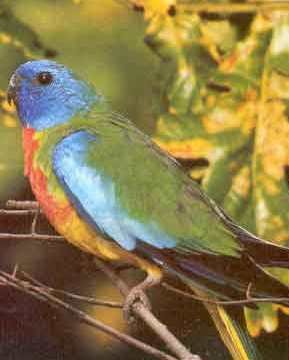 Neophema pulchella, Травяной попугайчик красногрудый. Splendid grass parrakeet or scarlet-cheted parrot